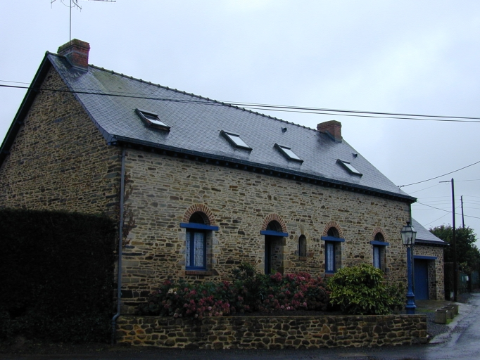 Ancienne Ecole - Mairie de la Selle Guerchaise en 1872